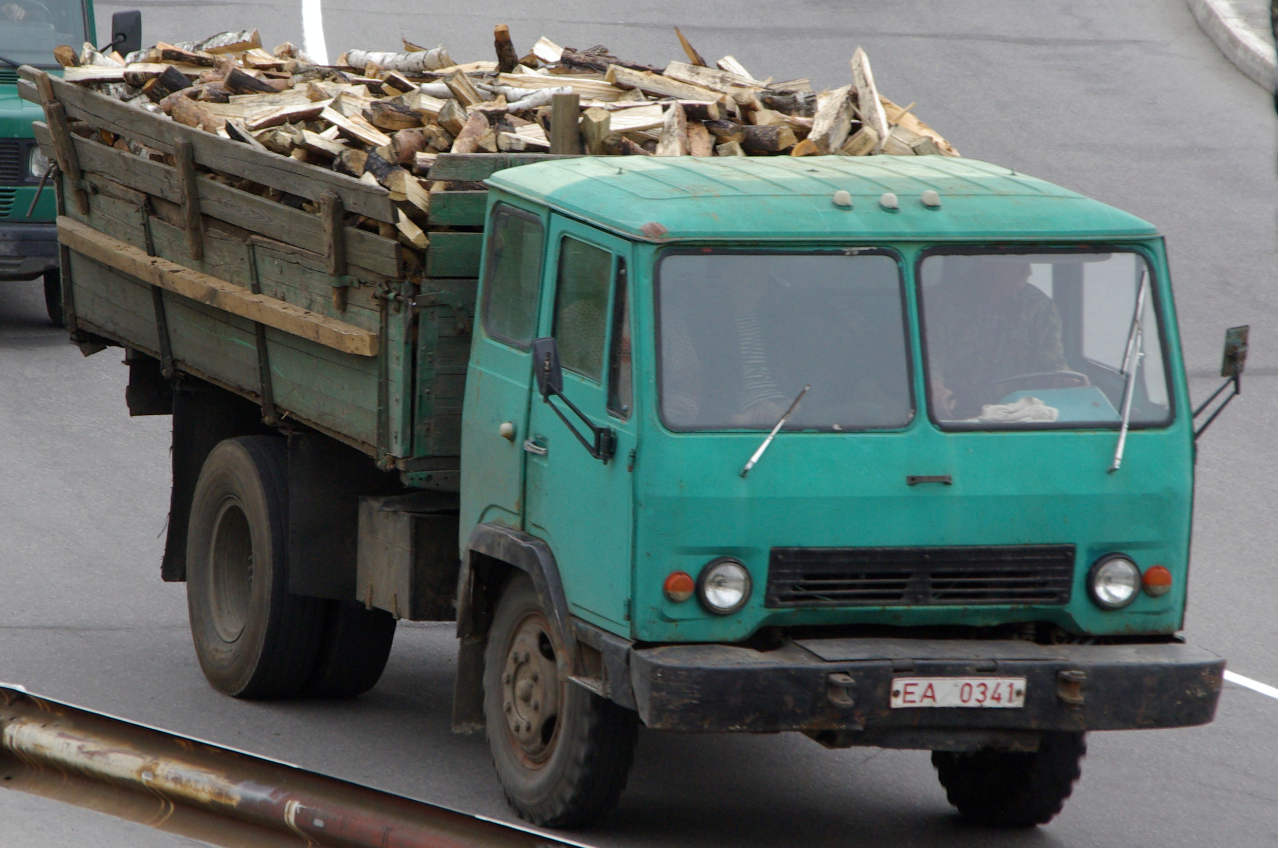 Mozyr tram fantrip. Мозырь - Mazyr, Belarus. KAZ-608V truck.